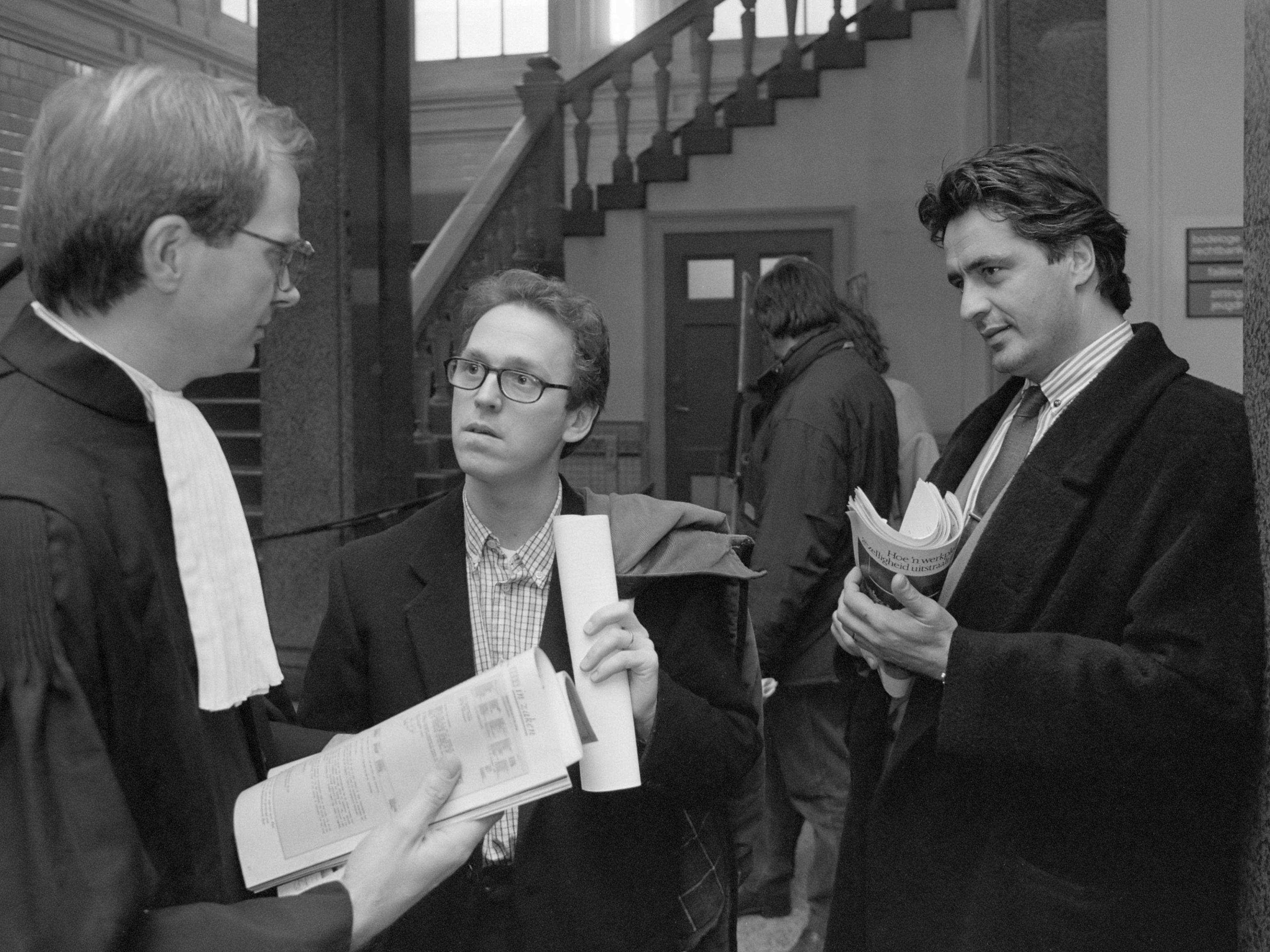 Kort geding van wethouder P. Stuart van Bergen op Zoom tegen het weekblad Nieuwe Revu. Van links naar rechts advocaat mr. Boukema met hoofdredacteur Derk Sauer en journalist Storms 25 januari 1989